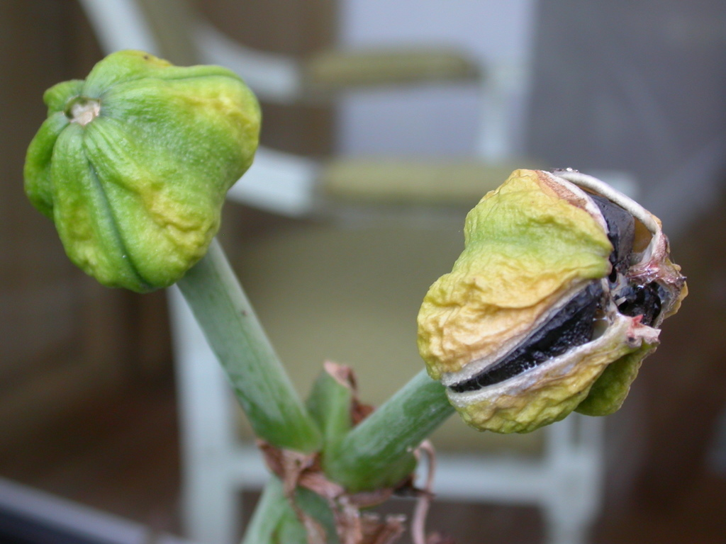 Fruit de l'hippeastrum - Hippeastrum pod